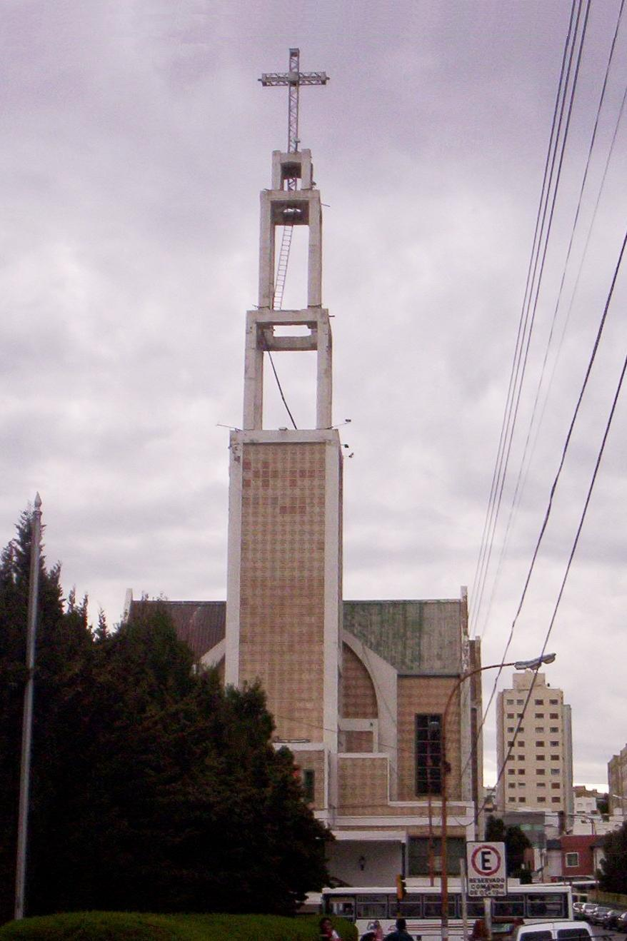 vista frontal de la Catedral San Juan Bosco de Comodoro Rivadavia